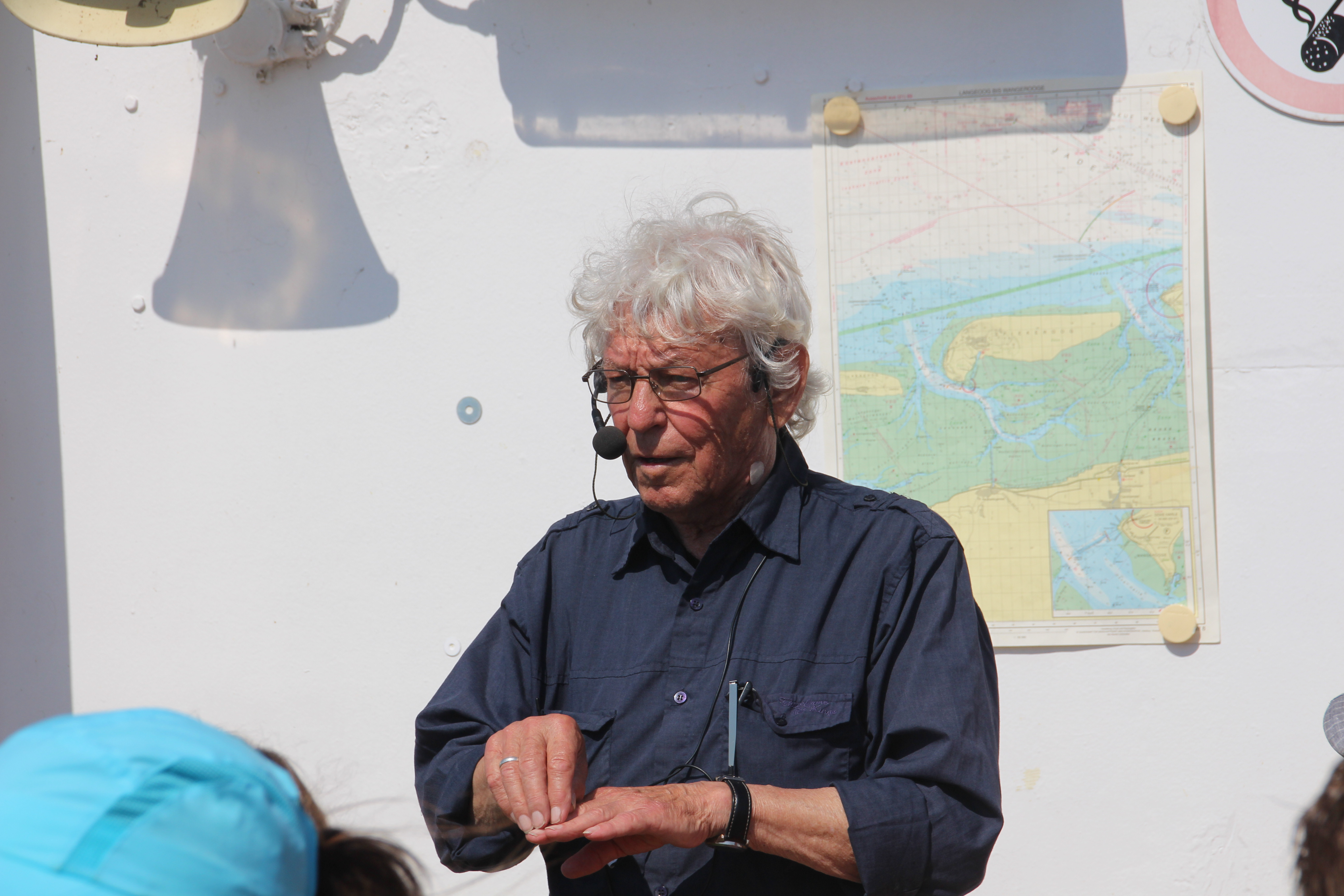 Umrundung der Insel Spiekeroog mit dem Fahrgastschiff Spiekeroog II am 23. Juli 2019 mit Claus Ulrich Bauer, Uli Bauer genannt. Uli Bauer erläutert den Passagieren die Ökologie der Insel, des Wattenmeeres, die Gezeiten, alles in der ökologischen Vernetzung. Das Schiff verlässt den Hafen auf Spiekeroog, fährt durch die Prile des Wattenmeeres in östliche Richtung, wendet sich vor Wangerooge nach Norden und durchquert das Seegatt der Harle zwischen Spiekeroog und Wangerooge. Dann fährt es in westlicher Richtung auf der Nordseite von Spiekeroog entlang, um sich dann nach Süden durch die Seegatts Otzumer Balje und Schillbalje östlich von Langeoog (und westlich von Spiekeroog) zu wenden und erneut das Wattenmeer zu erreichen. Dann geht es an der Sandbank Janssand vorbei zurück zum Spiekerooger Hafen.